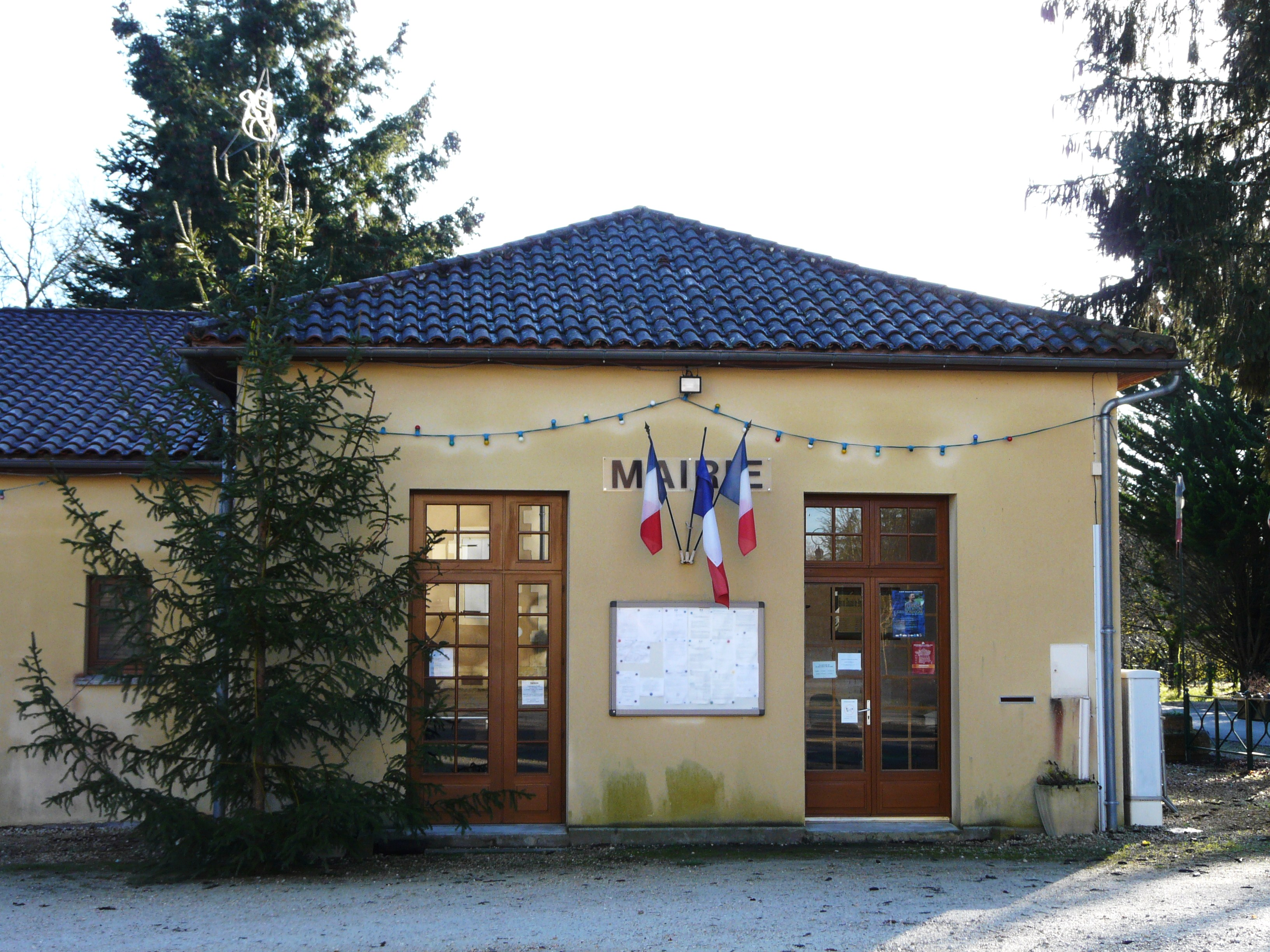 La mairie de Saint-Amand-de-Vergt, Dordogne, France.